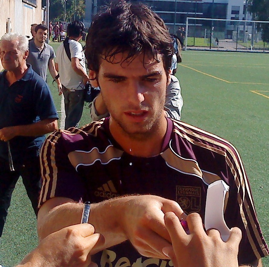 Yoann Gourcuff à la fin de son premier entrainement avec l'Olympique lyonnais